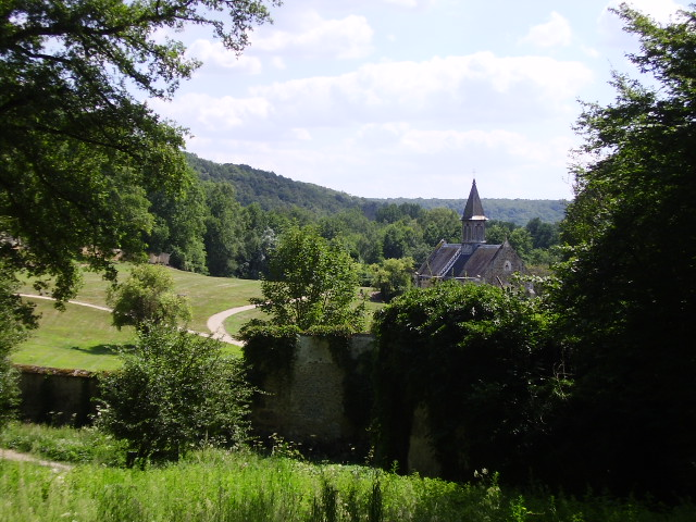 Le site de l’abbaye de Port-Royal-des-Champs depuis les Cent marches